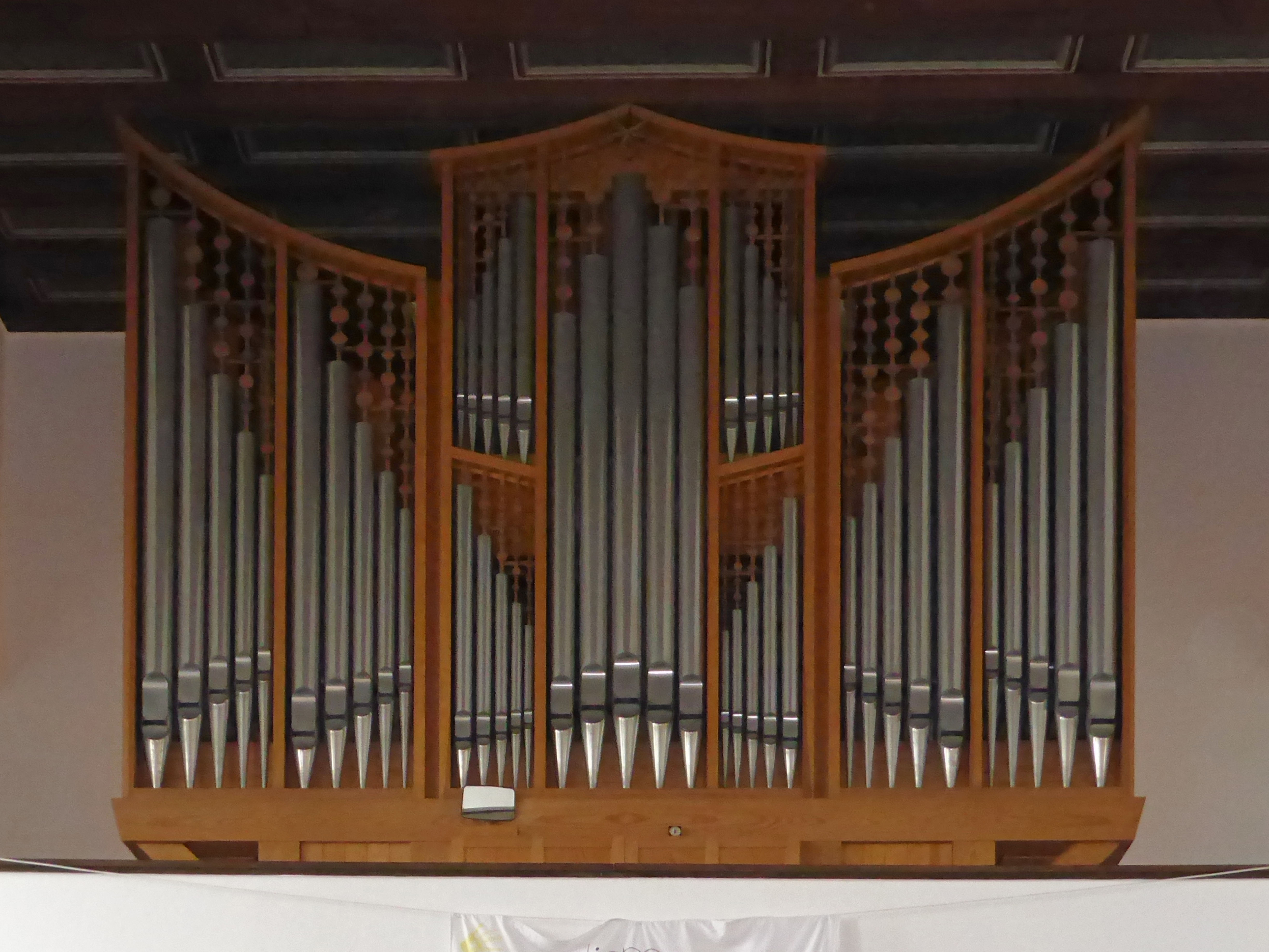 Orgel der katholischen Kirche in Fallersleben.